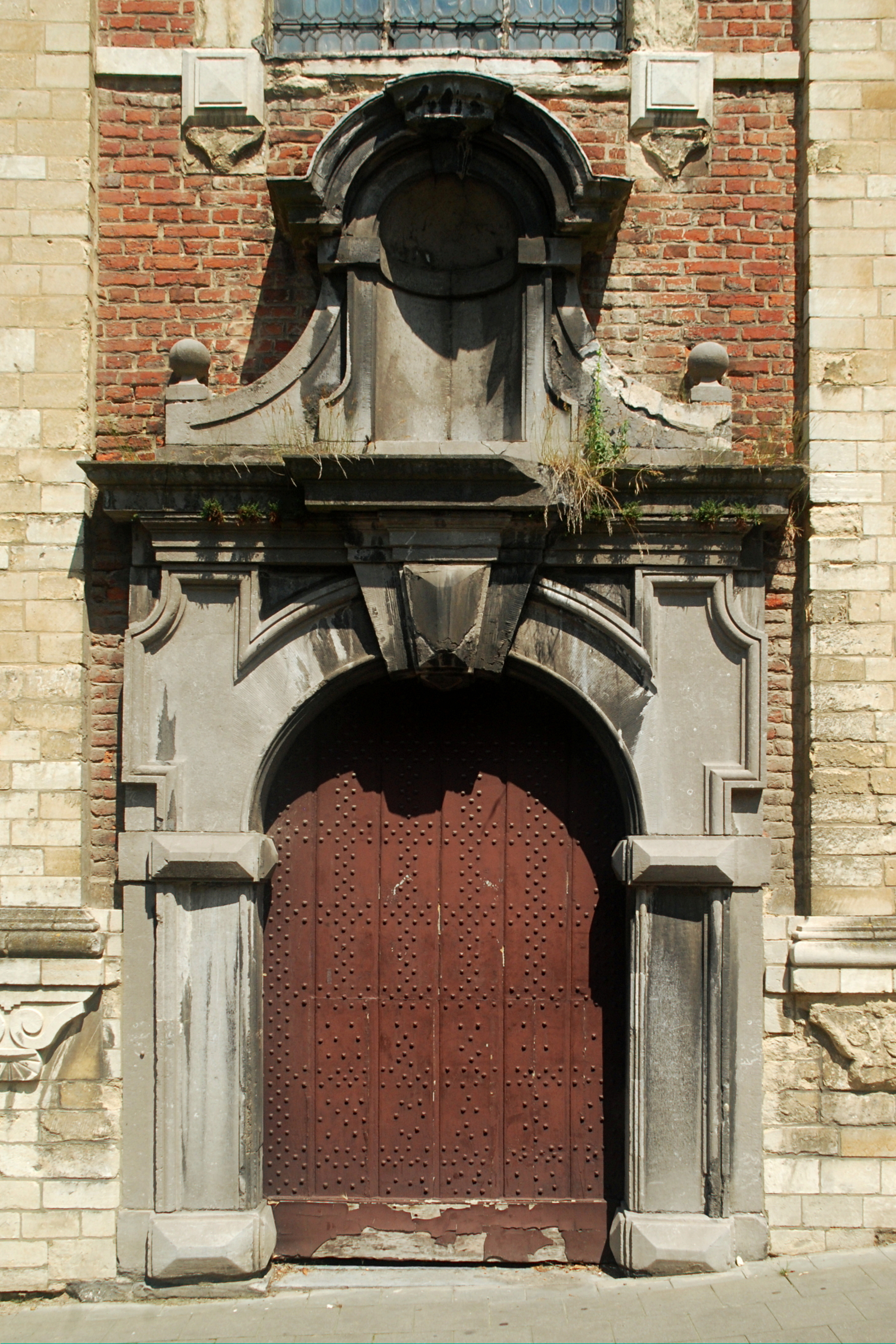 Belgique - Brabant flamand - Louvain (Leuven) - Chapelle des Sœurs Noires (Zwartzusterskapel)